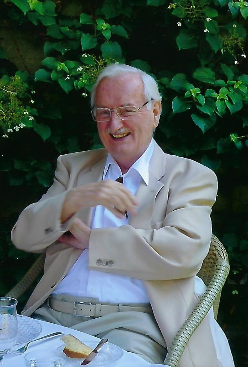 Generalarzt a. D. Dr. Horst Hennig.